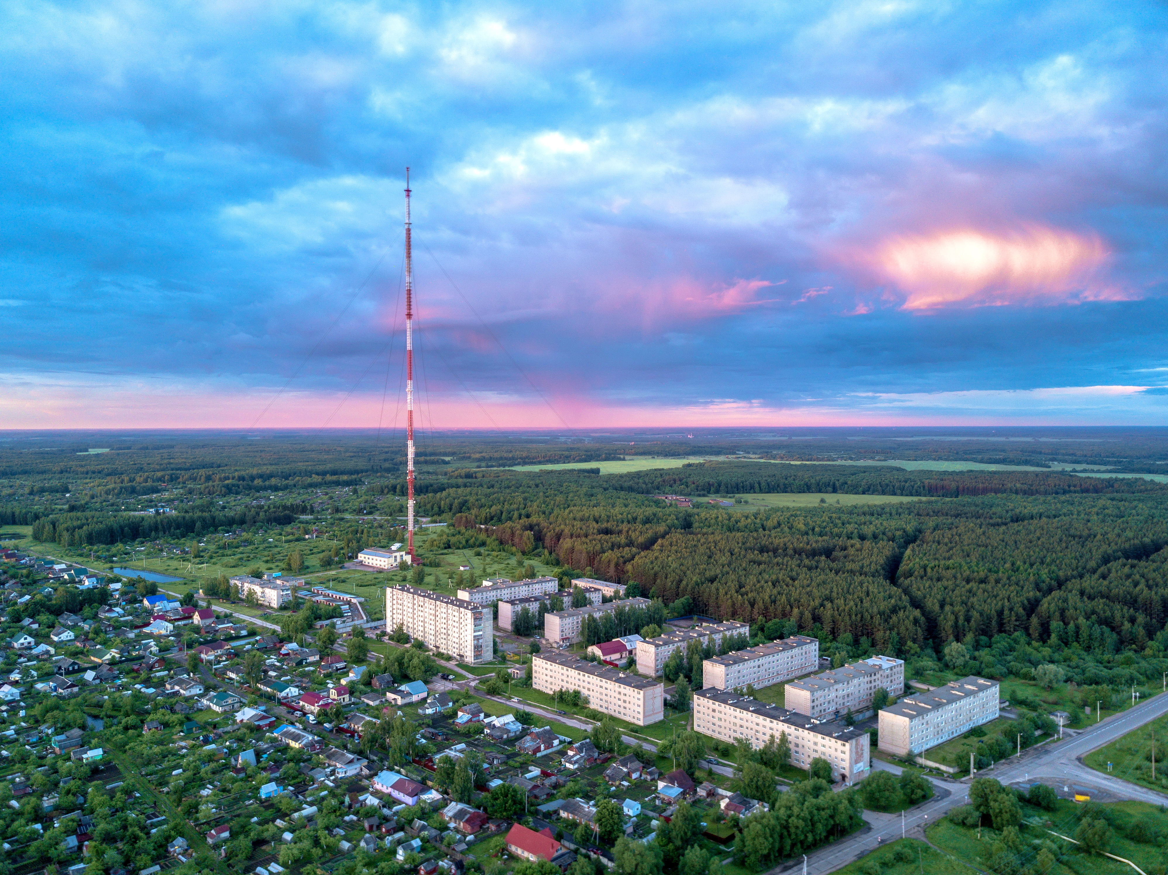 Вид на телемачту в городе Родники Ивановской области